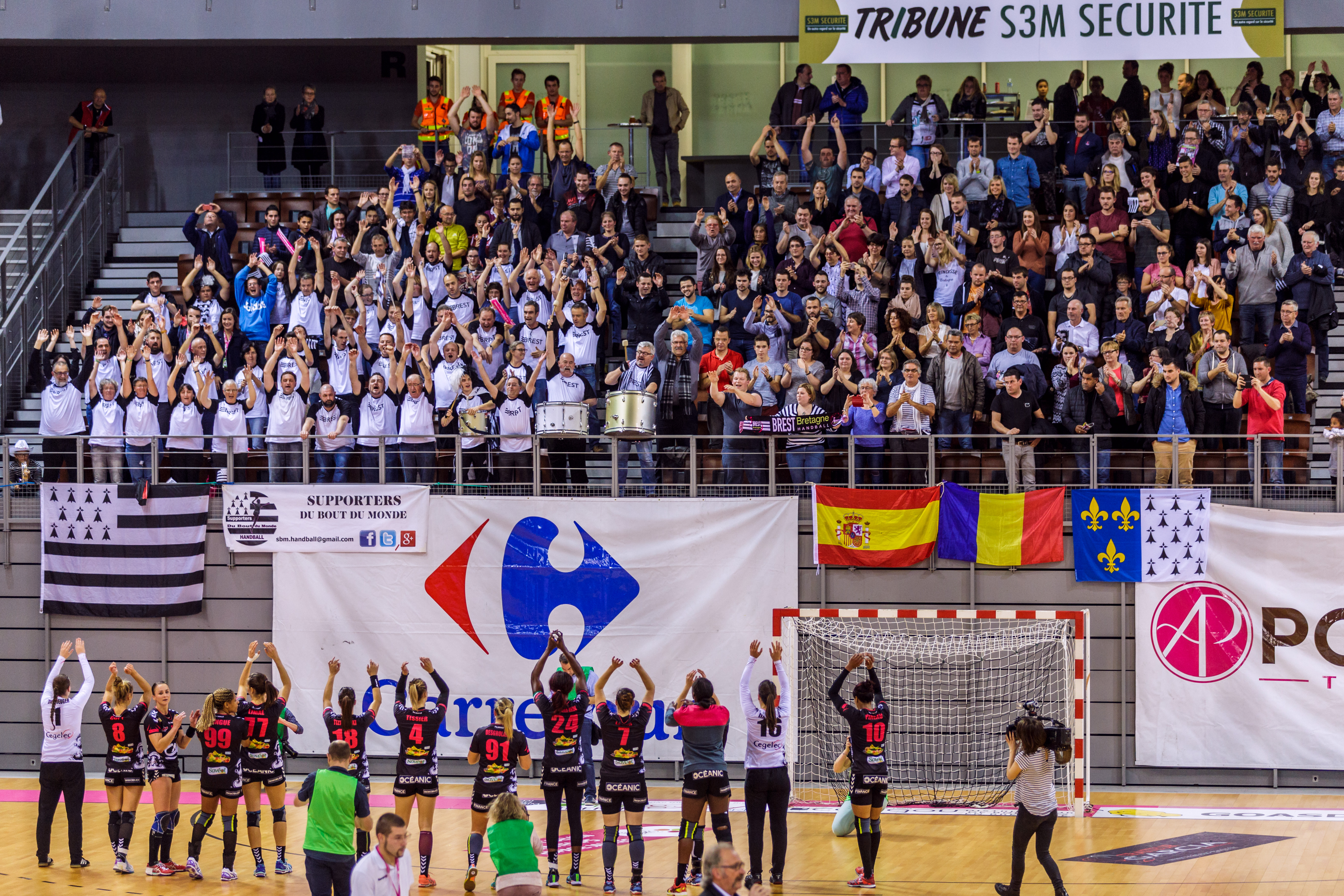 Match de handball du BREST Bretagne Handball à domicile face à Besançon (Entente Sportive Bisontine Féminin) le 16 novembre 2016. La Brest Arena a vu son club l'emporter 24-21.